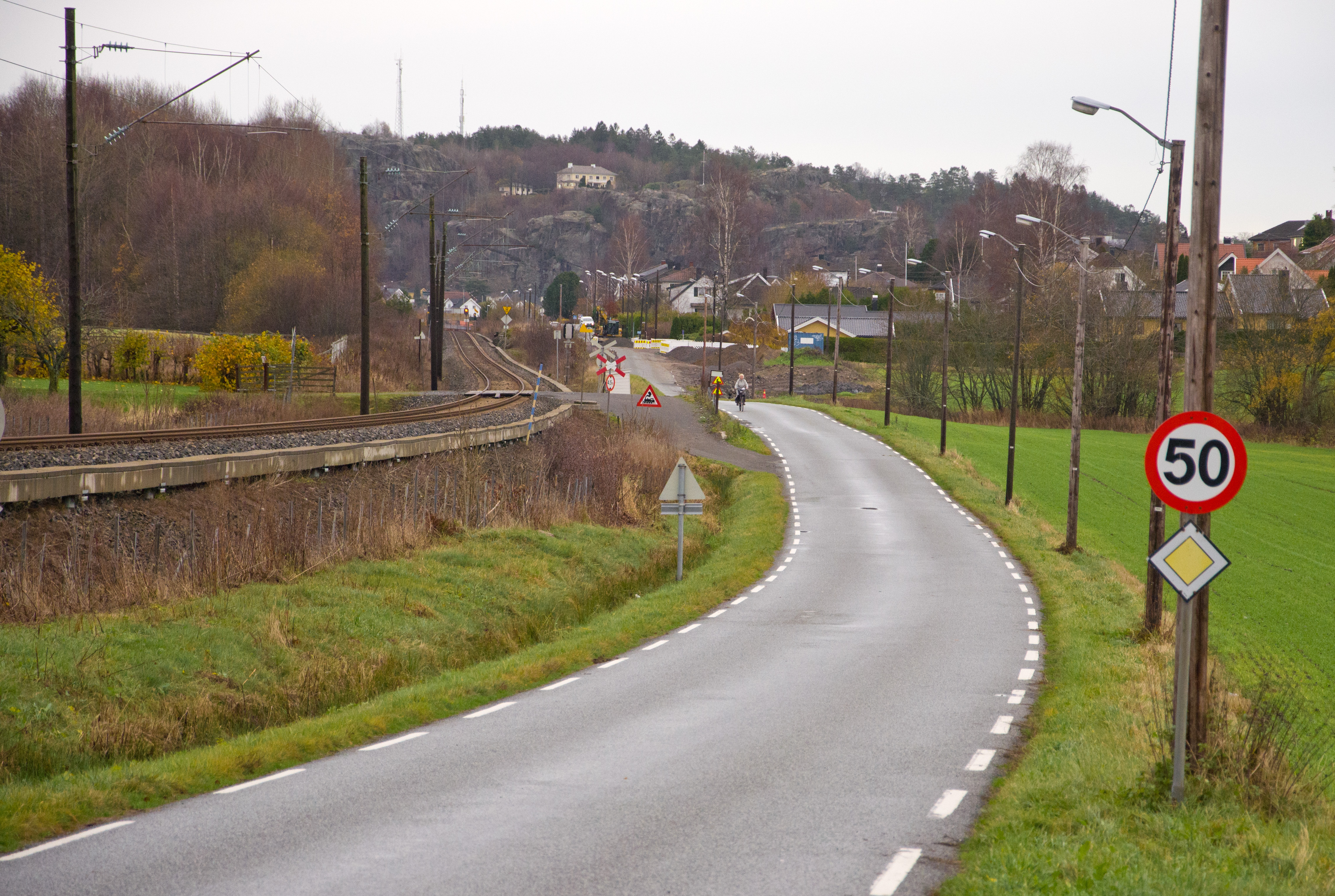 Vestfolds fylkesvei 180 Skiringssalveien